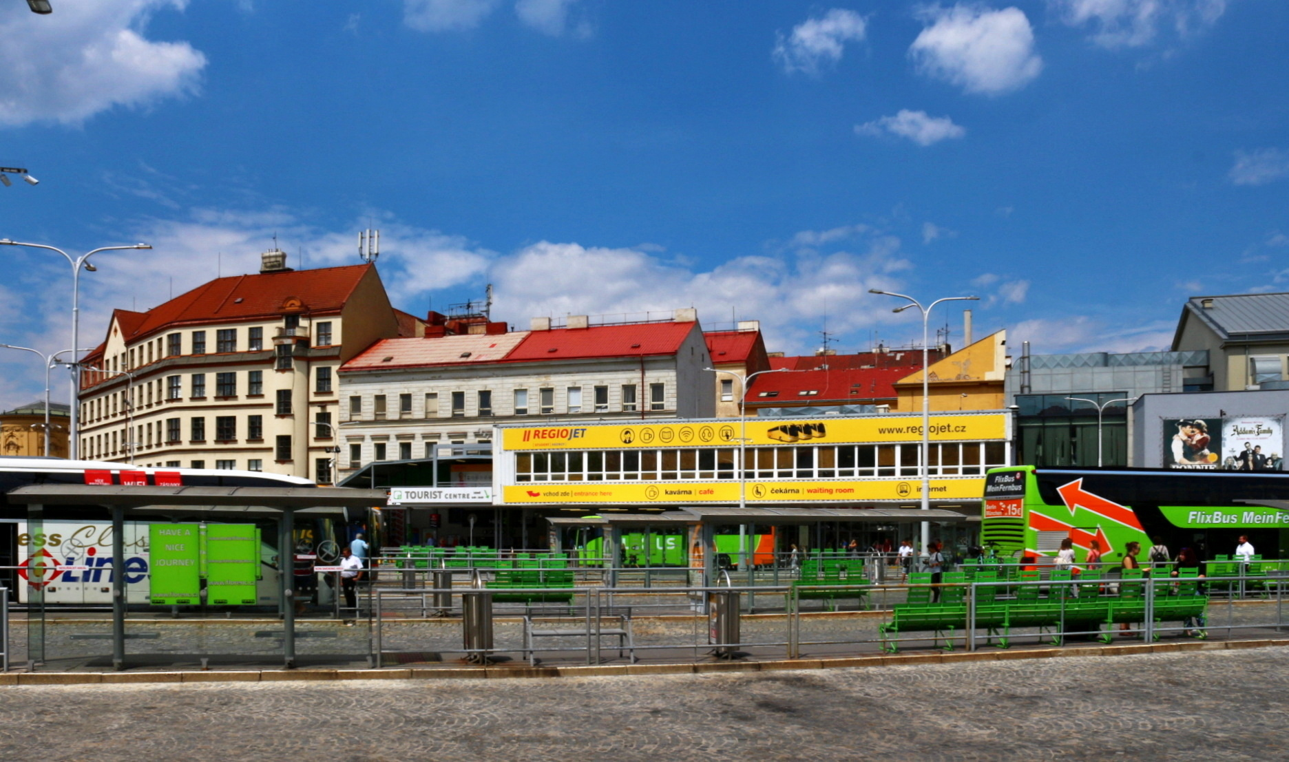 ÚAN Praha-Florenc